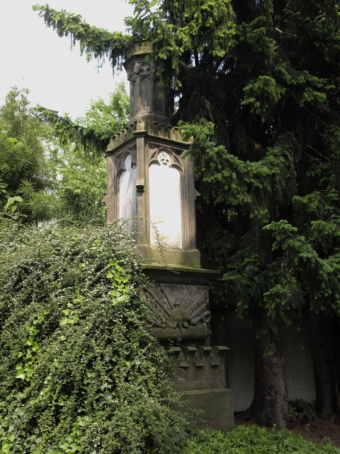 Kriegerdenkmal für in Barmer Lazaretten verstorbene Soldaten des Feldzuges 1870/71 auf dem reformierten Friedhof Barmen, Bartolomäusstraße, errichtet 1873